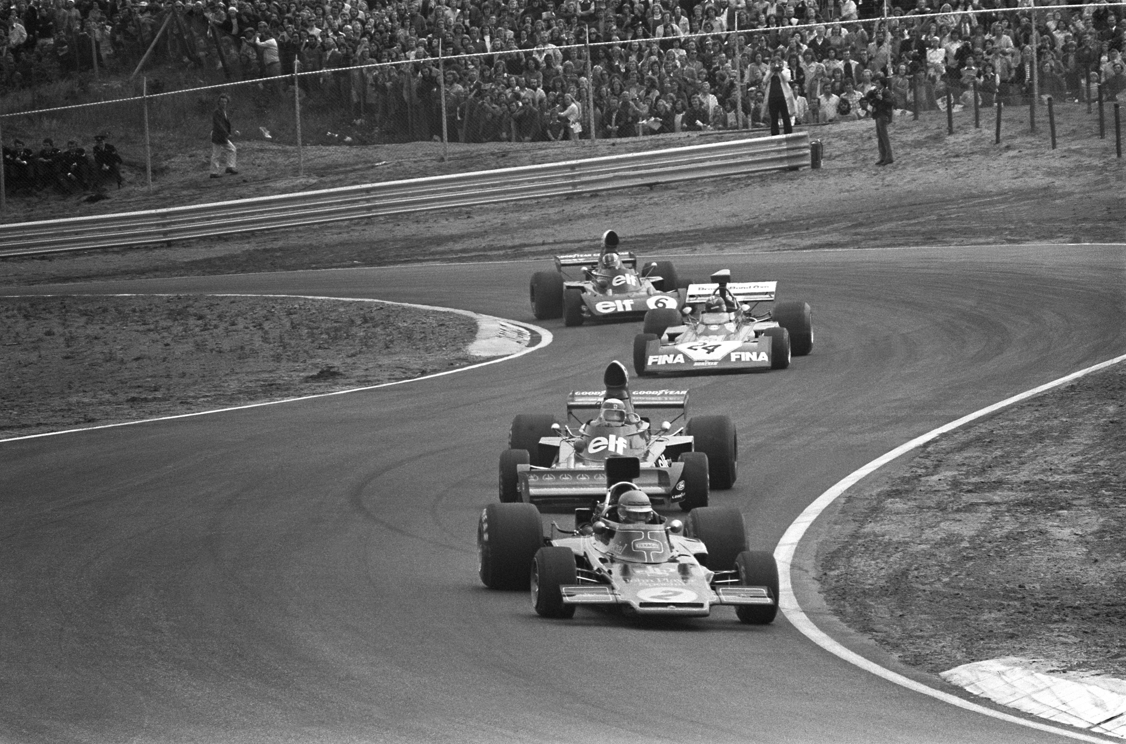 Grote Prijs van Nederland voor Formule I wagens op circuit Zandvoort, Ronnie Peterson, in 2e positie Jackie Stewart , 5 Van Lennep.